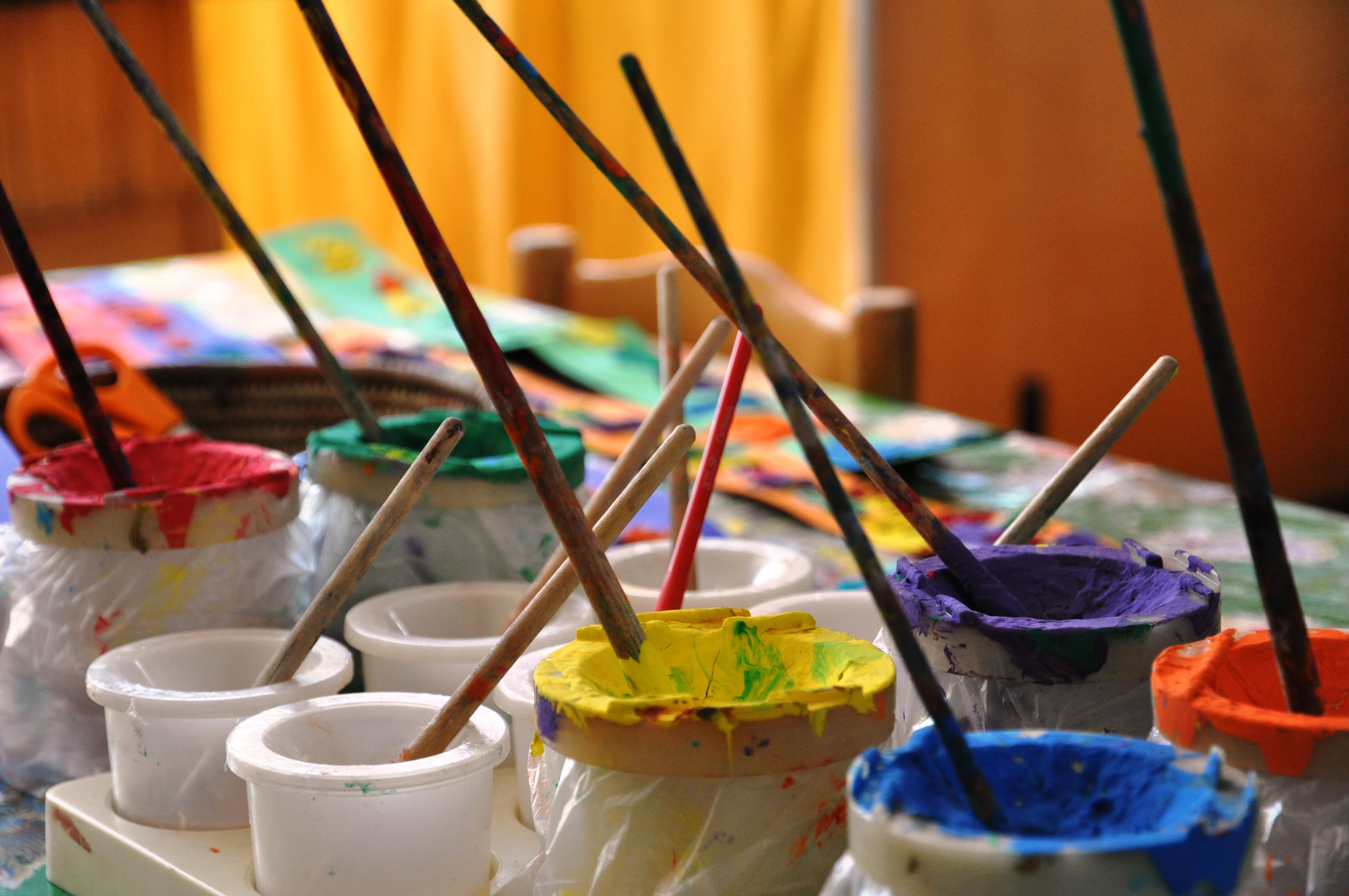 Verfbekers met kwasten op de Werkplaats Kindergemeenschap in Bilthoven.